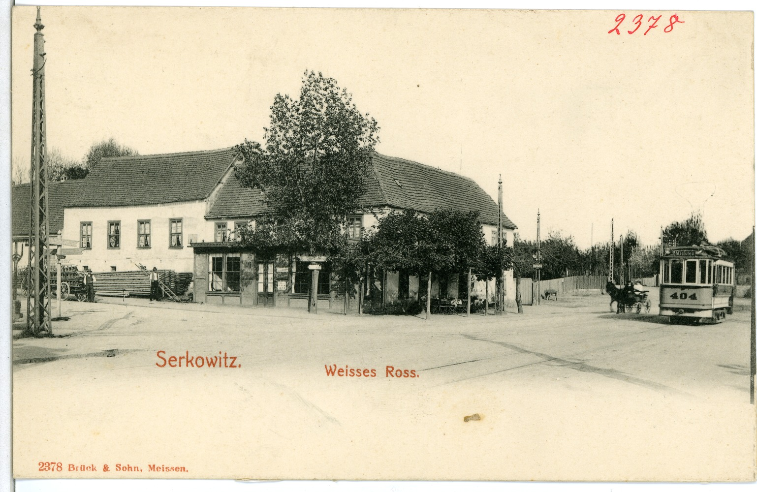 Serkowitz; Weißes Roß This postcard is from publisher Brück & Sohn in Meißen ( postcard has a unique number 02378 and is available in a higher resolution at the publisher. This images was uploaded in a cooperation project between Wikipedians and the publisher.